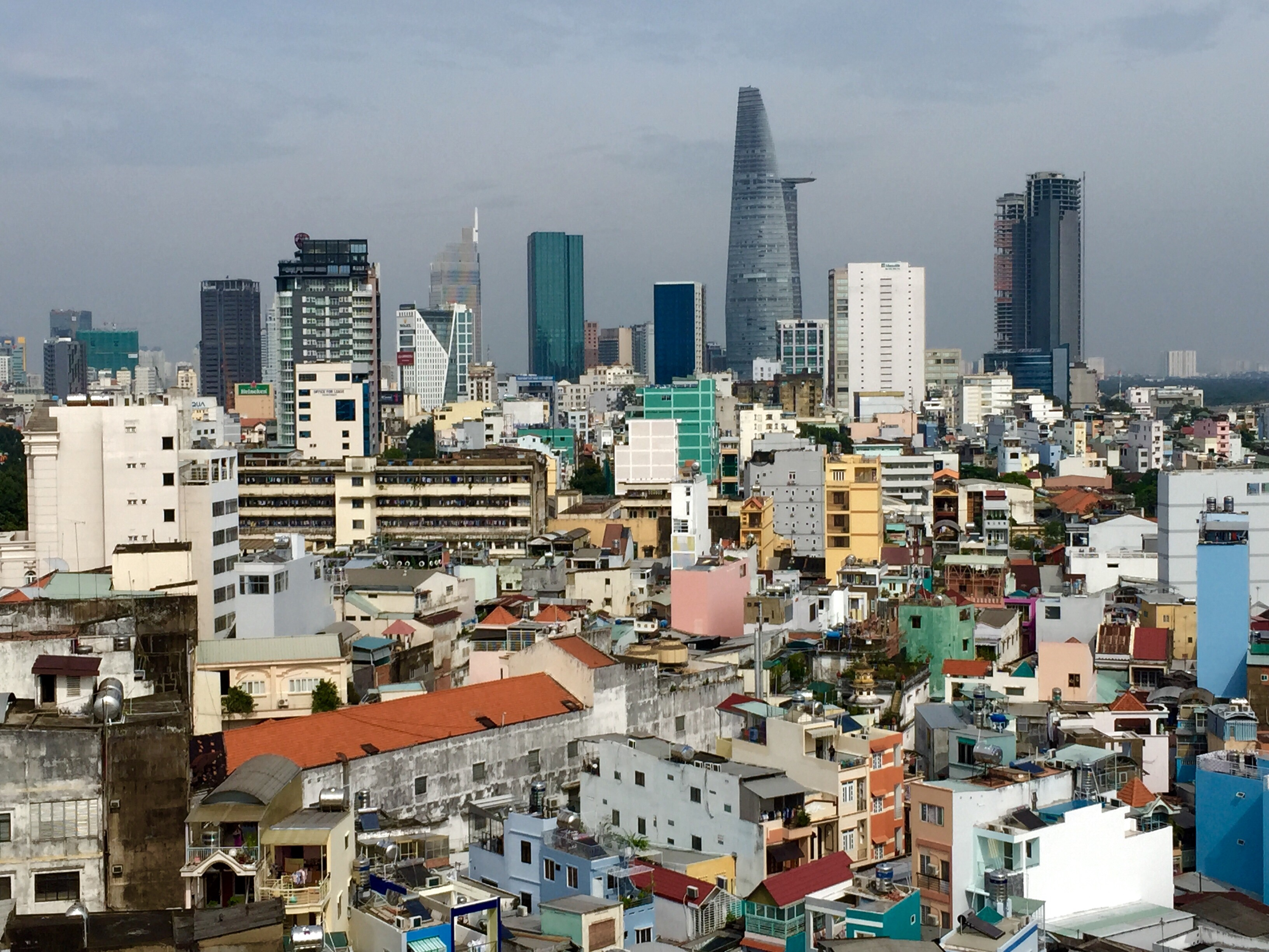 Tran hung dao street, ward Co giang district 1, hcm city